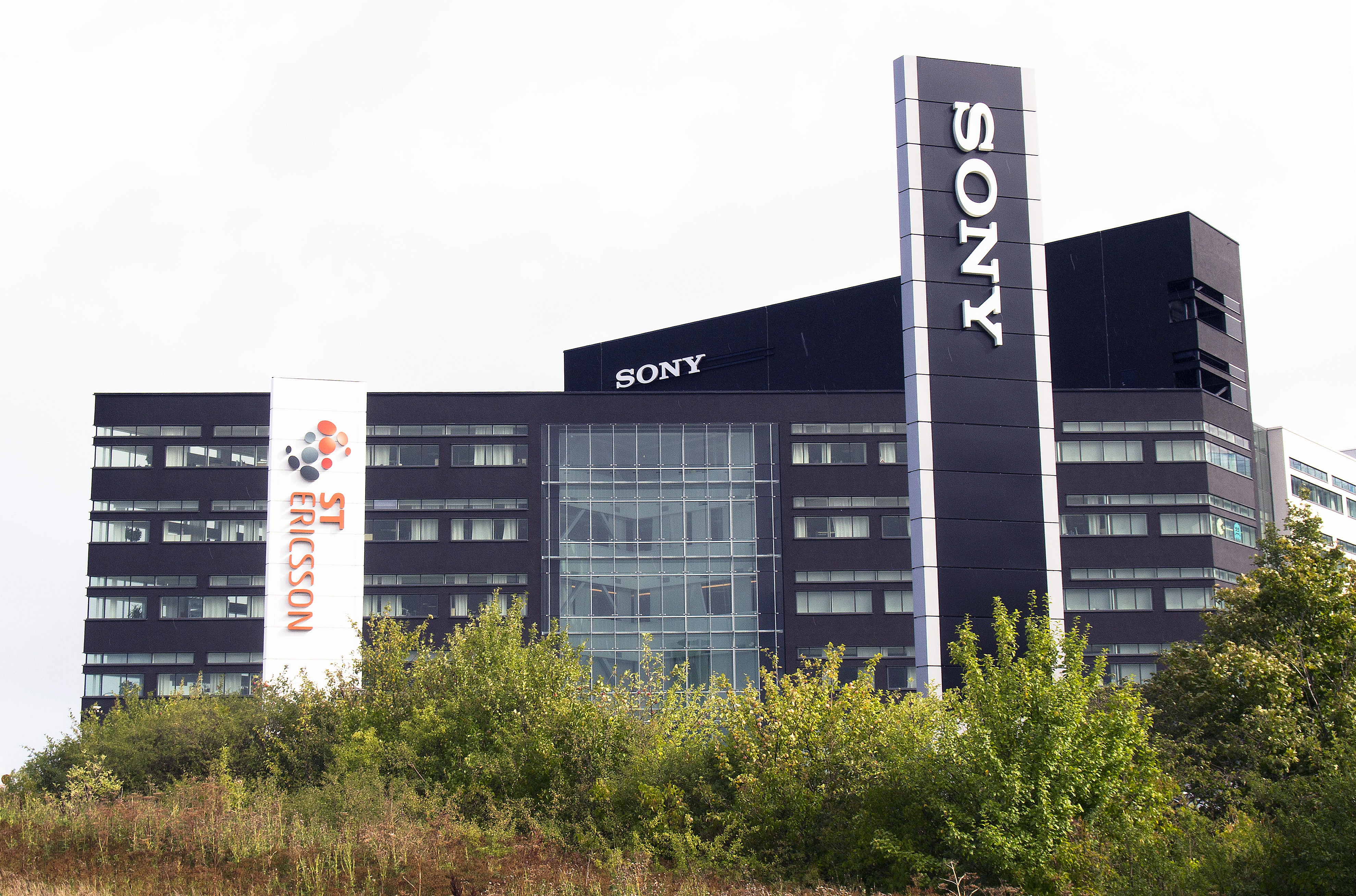 Mobilplattformföretaget ST Ericssons skylt i Lund vid Sony Mobiles skylt och kontor den 19 sept 2012. Foto: News Øresund – Johan Wessman. © News Øresund. Bilden får fritt publiceras under förutsättning att källa anges (Foto: News Øresund + fotografnamn). (The picture can be used freely under the prerequisite that the source is given. ) Originalfil tillhandahålles gratis, kontakta: News Øresund, Malmö, Sweden. News Øresund är en oberoende regional nyhetsbyrå som ingår i projektet Øresund Media Platform som drivs av Øresundsinstituttet i partnerskap med Lunds universitet och Roskilde Universitet och med delfinansiering från EU (Interreg IV A Öresund) och 14 regionala, icke kommersiella aktörer.